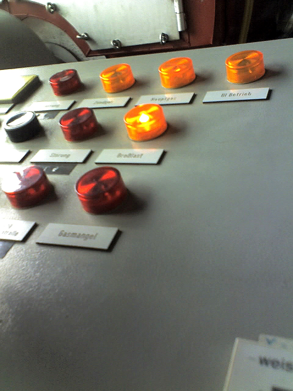 Kontrolpult zweier Flammrohrrauchrohrkessel